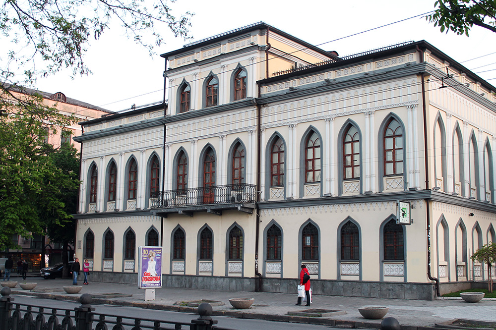 Будинок губернатора (Дніпро).